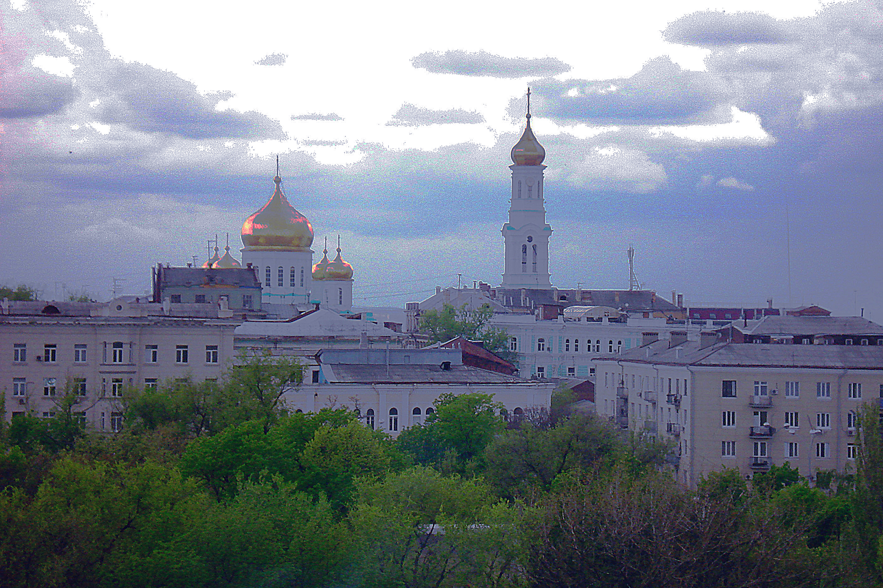 Кафедральный собор рождества богородицы (Ростовская область, Ростов-на-Дону, станиславского улица, 58)